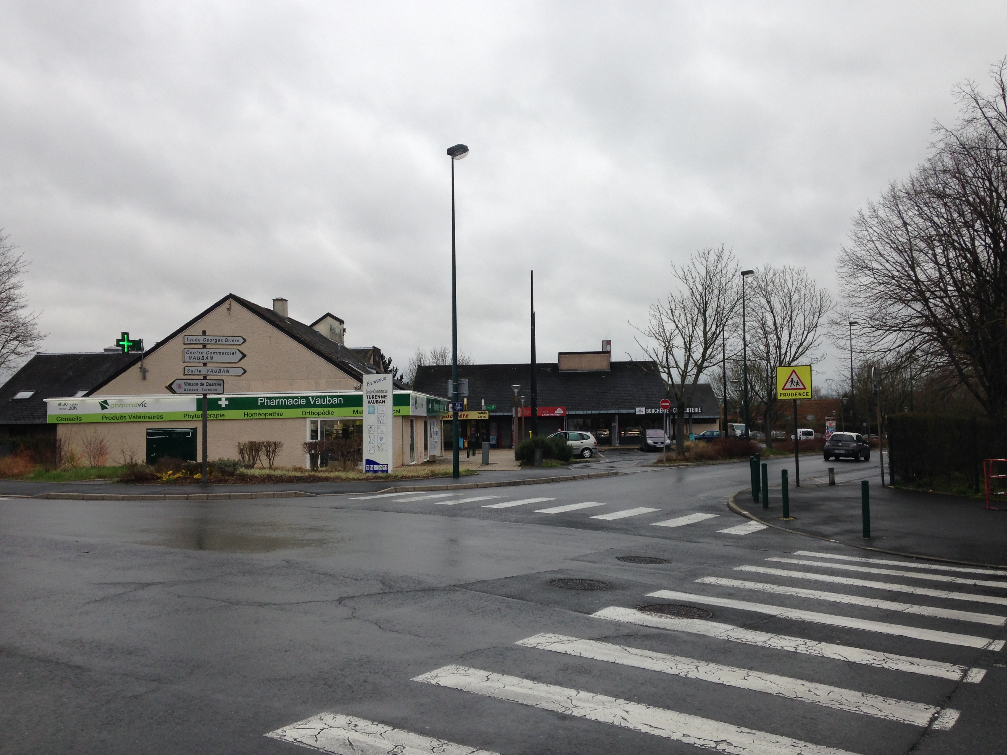 Vue du centre commercial "Vauban" depuis la rue Turenne.